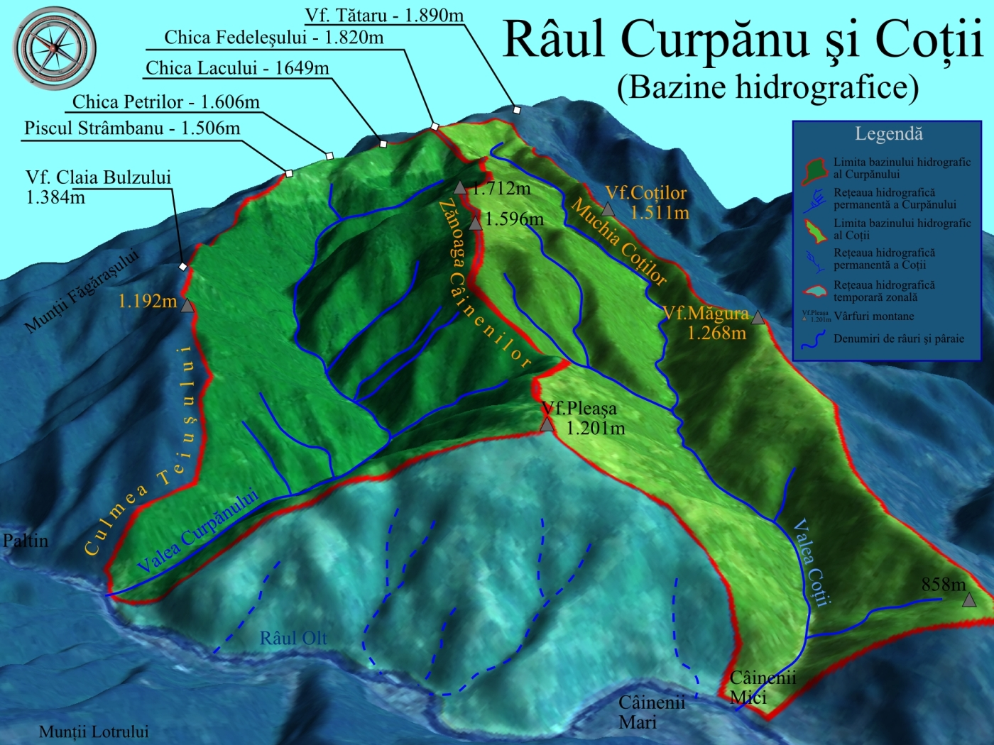 Harta 3D pentru Bazinul Râului Curpănu şi Coţii, afluenţi ai Oltului. Selectați alte bazine hidrografice adiacente ale Defileului Oltului, menționate pe hartă în mod senzitiv cu chenare de note informative.